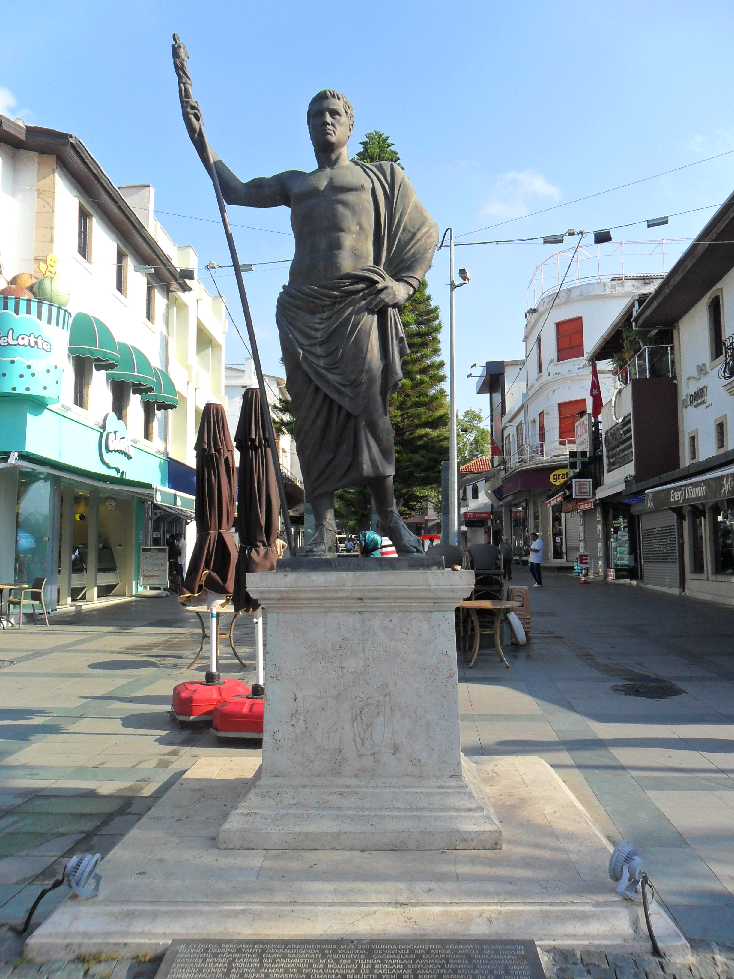 Kale Kapısı mevkiisindeki II. Attalos Heykeli.